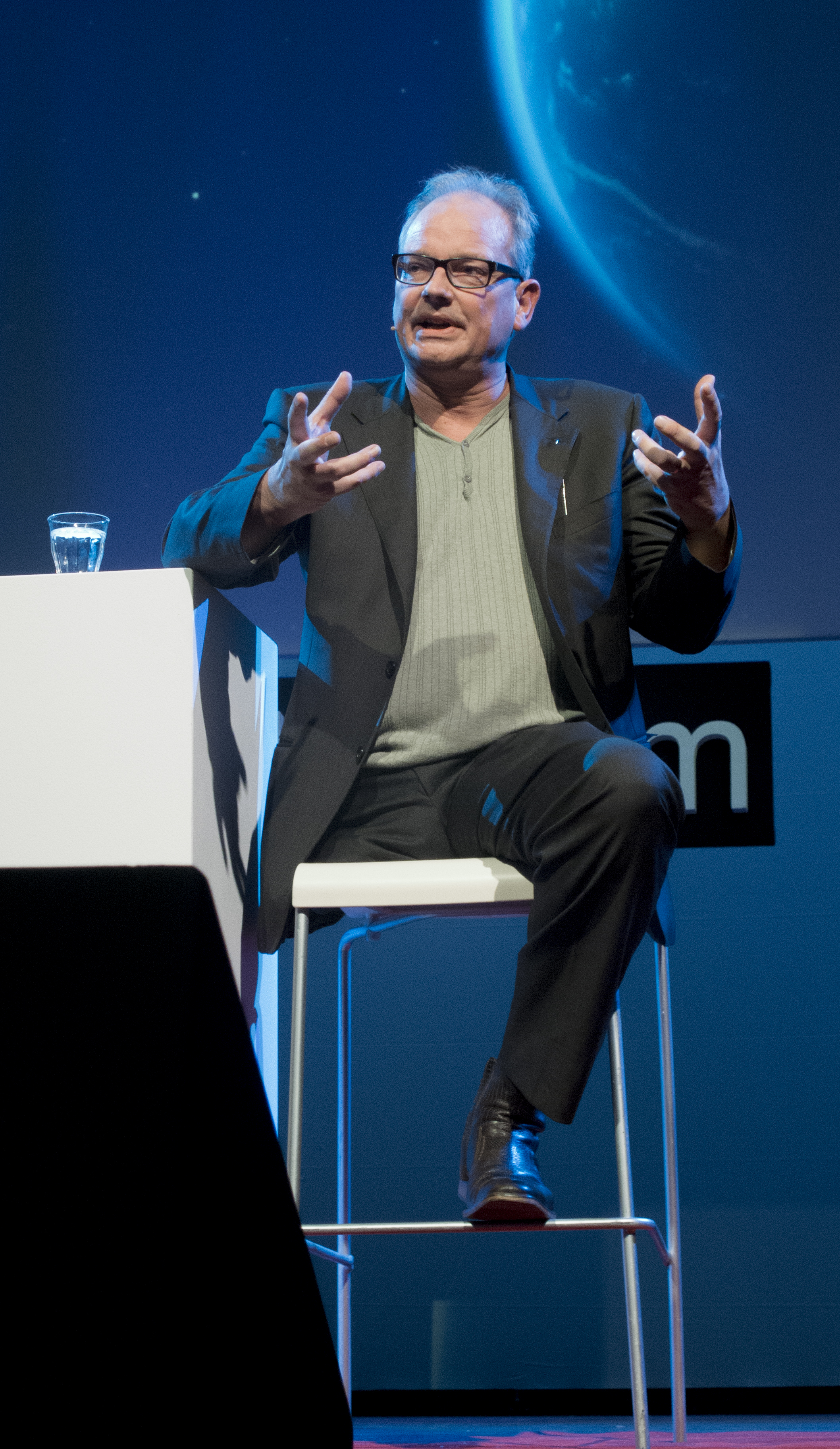 René Gude speaking at TEDxAmsterdam